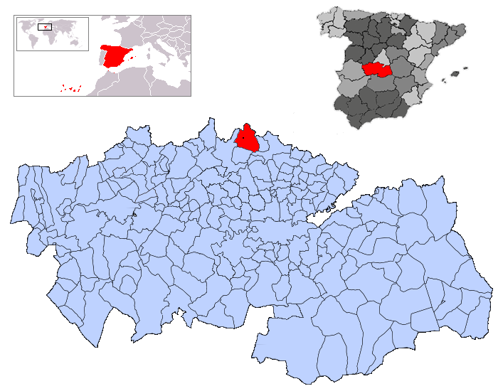 Méntrida en la provincia de Toledo